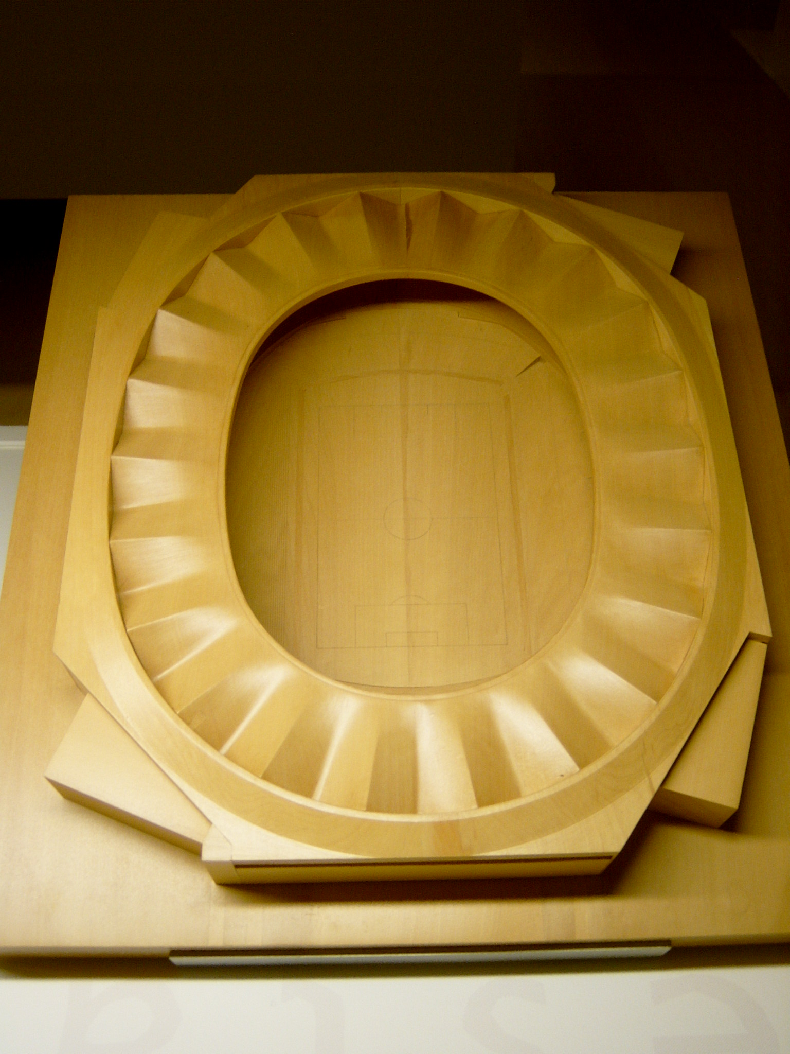 Estadio Olímpico de Sevilla (Sector Norte Isla de la Cartuja, Sevilla); maqueta.